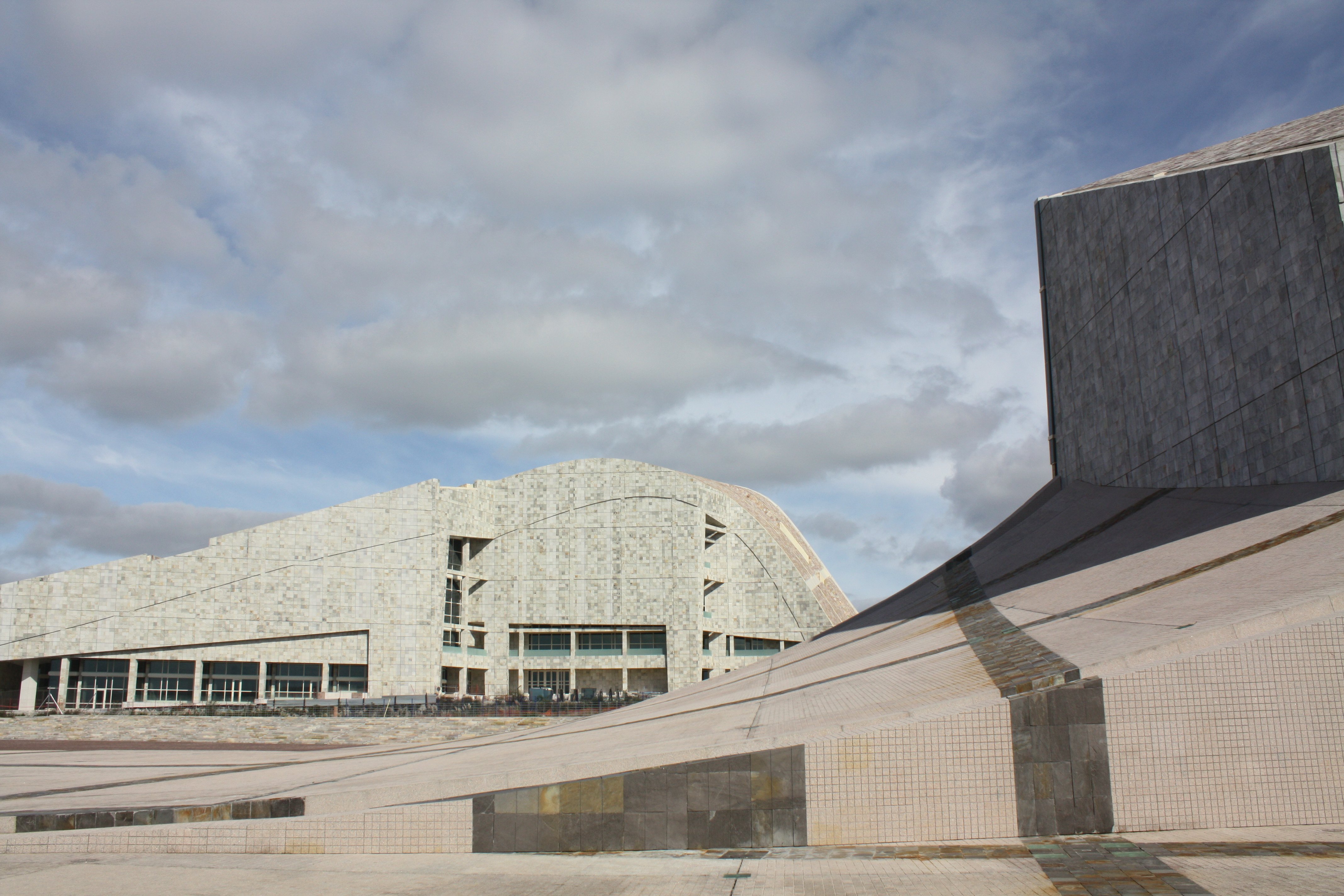 Museo de Galicia, na Cidade da Cultura.